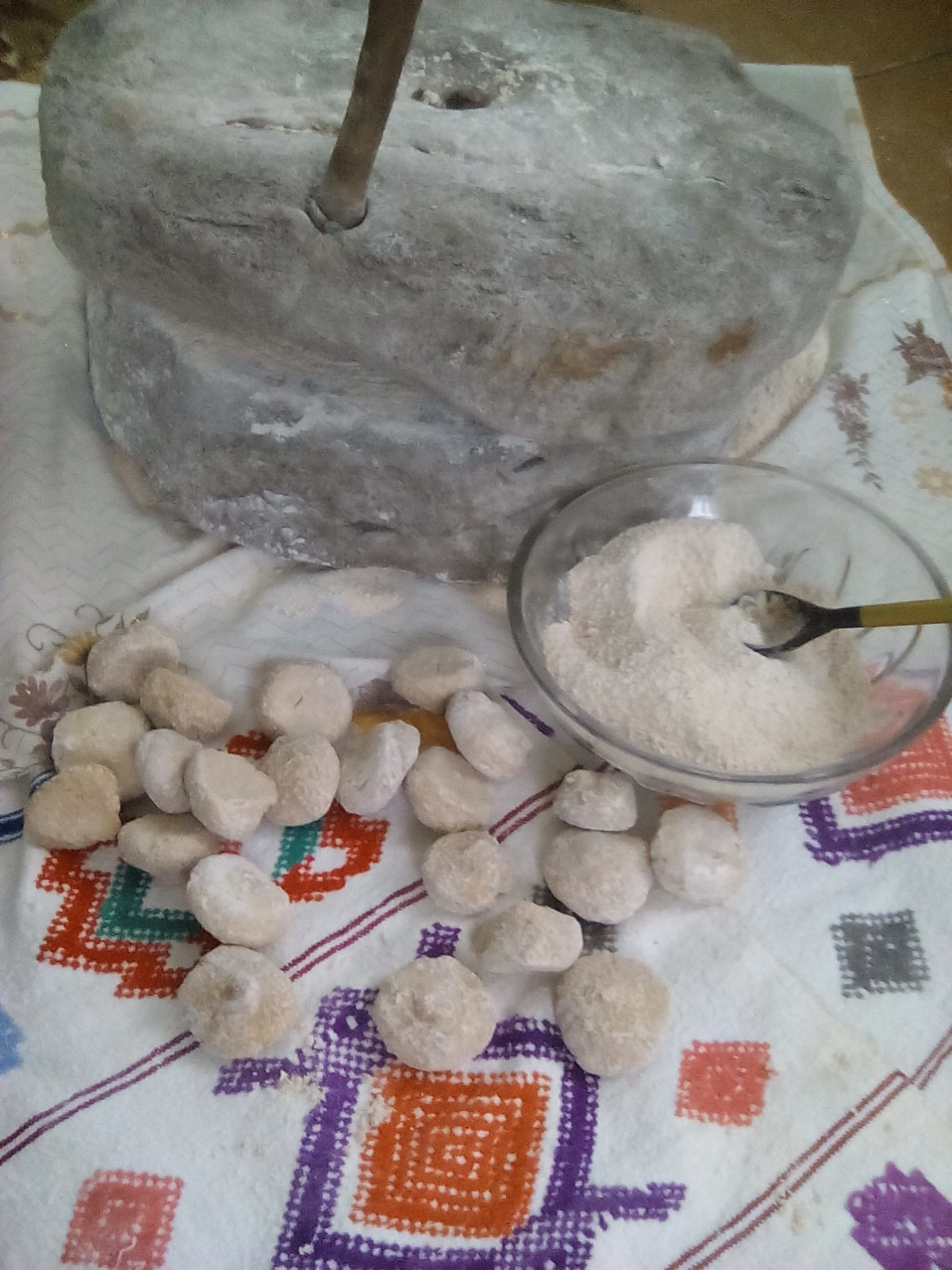 Бөрйән районы Иҫке Собханғол ауылында Рәшиҙә Ғизәтуллина әҙерләне